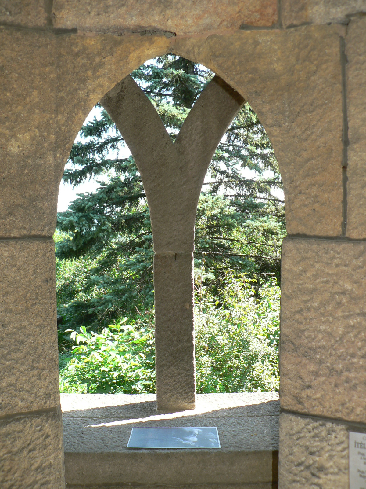 Pogány-torony belső tér